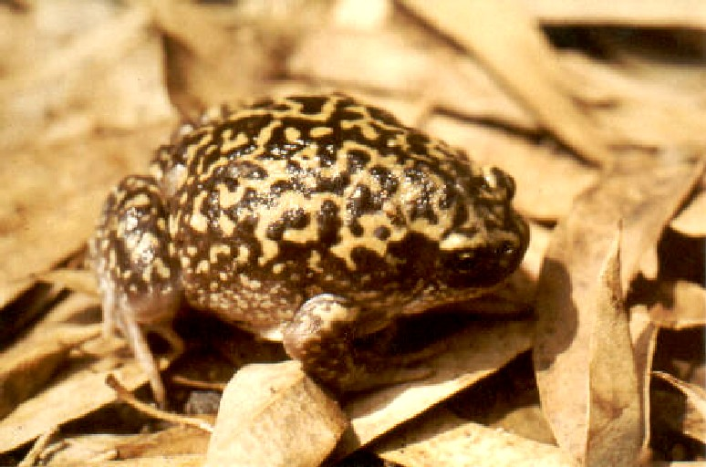 Uperodon systoma